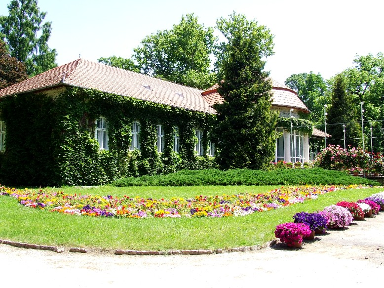 Vágyázó kastély, Vácrátót. Saját kép. . Egresi János 2006. szeptember 23., 15:18 (CEST)